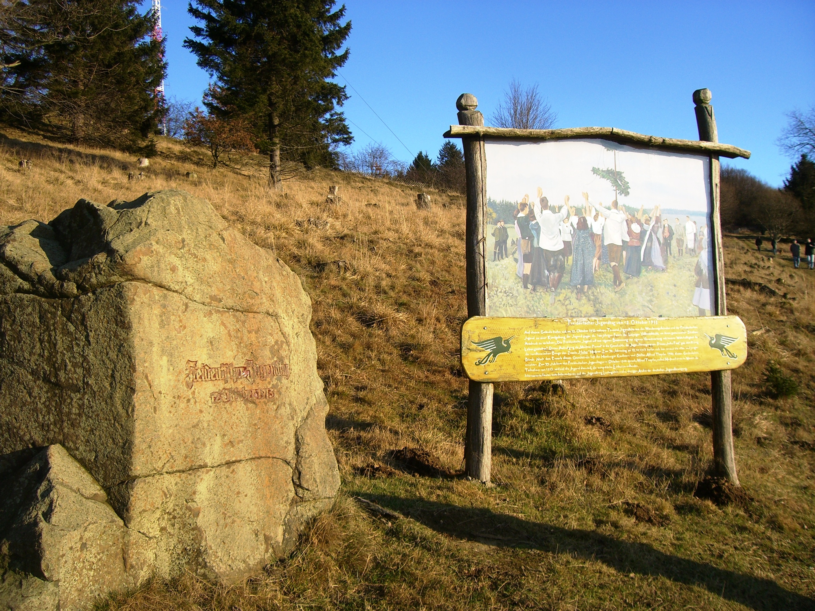 Auf der Informationstafel ist zu lesen: Freideutscher Jugendtag vom 12. Oktober 1913 Auf diesem Gelände trafen sich am 12. Oktober 1913 mehrere tausend Jugendliche aus den Wandervogelbünden und der Freideutschen Jugend zu einer Kundgebung der Jugend gegen die 100jährigen Feiern der Leipziger Völkerschlacht, um ihrem gemeinsamen Streben Ausdruck zu verleihen: „Die Freideutsche Jugend will aus eigener Bestimmung vor eigener Verantwortung mit innerer Wahrhaftigkeit ihr Leben gestalten“. Dieser Aufruf ging als „Meißner-Formel“ in die Geschichte der Jugendbewegung ein. Dieses „hohe Fest“ gab dem König der nordhessischen Berge den Zusatz „Hoher“ Meißner. Zum 50. Jahrestag am 12. 10. 1963 trafen sich erneut die alten und die jungen Bünde. Nach Erwerb des Grundstückes ließ der Hamburger Kaufmann und Stifter Alfred Toepfer 1984 diesen Gedenkstein errichten. Zum 75. Jubiläum des Freideutschen Jugendtages im Oktober 1988 sprach Alfred Toepfer, selbst Meißnerfahrer, im Namen der Teilnehmer von 1913, und rief die Jugend dazu auf, die europäische Einheit zu vollenden. Interessierte finden mehr Informationen auf der Jugendburg Ludwigstein und im dortigen Archiv der deutschen Jugendbewegung.